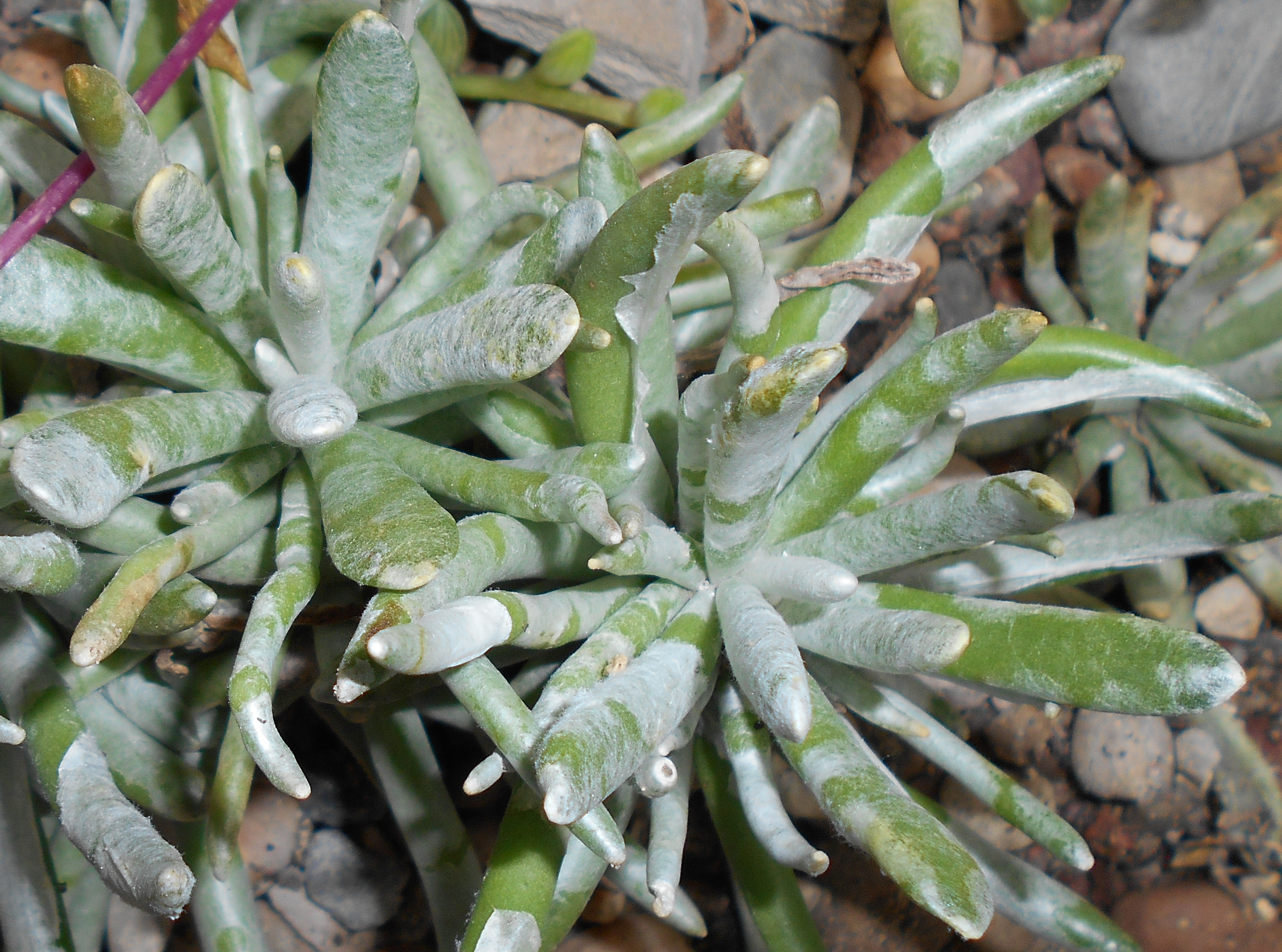 Senecio scaposus, Ogród Botaniczny UMCS w Lublinie